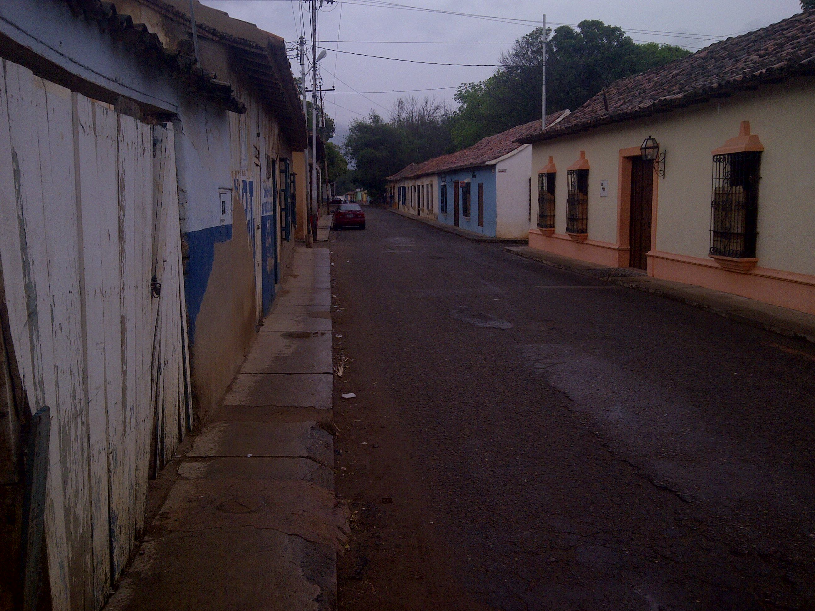 Curarigua